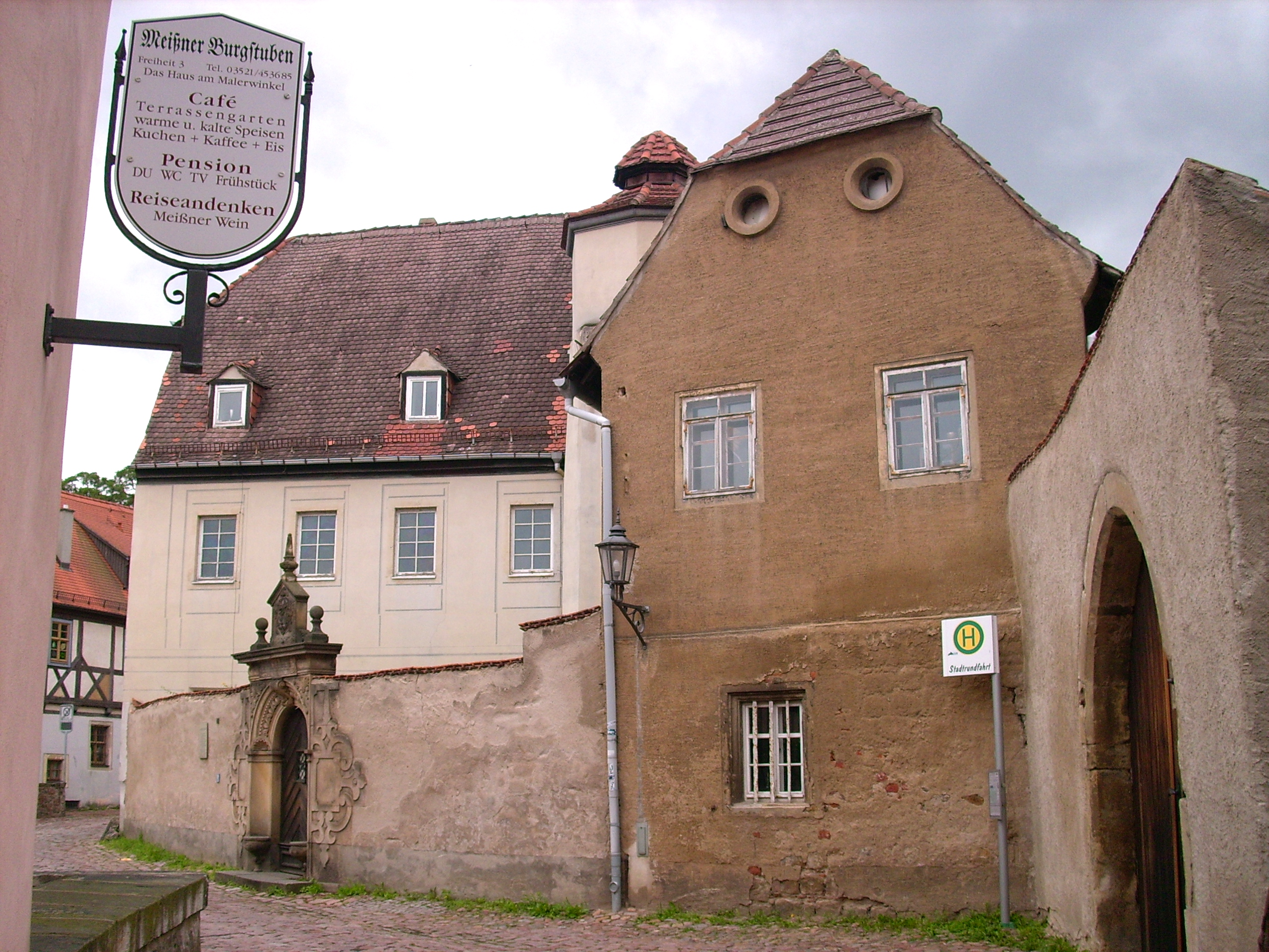 Wohnhaus, Freiheit 1 in Meißen